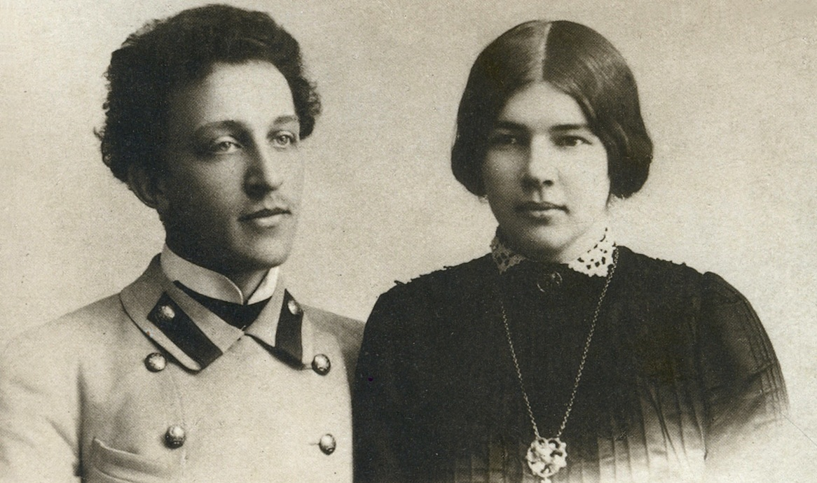 Lubov Blok